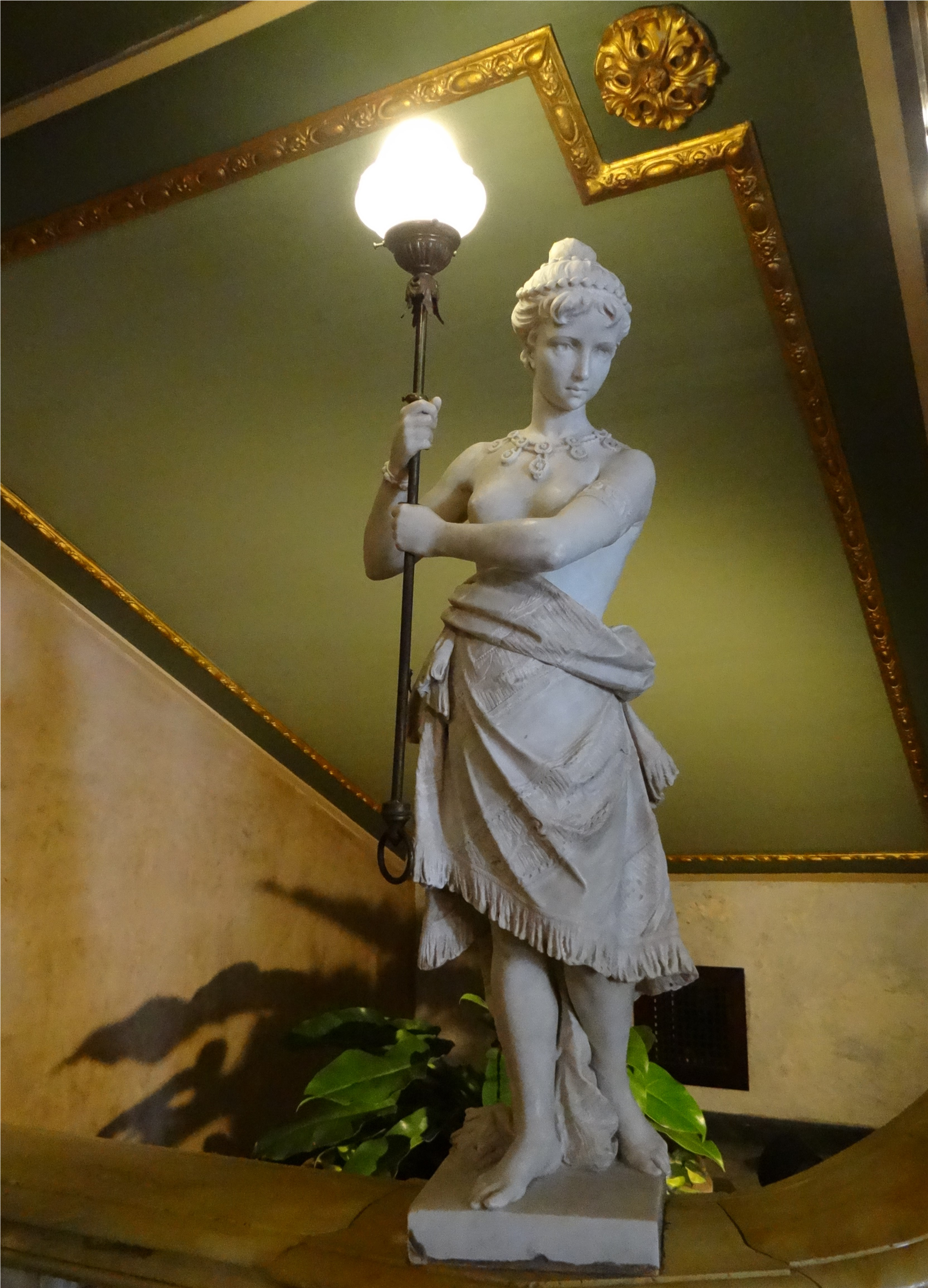 Lampes ornées de statues en bronze représentant Cupidon, Théâtre National, San José, Costa Rica.